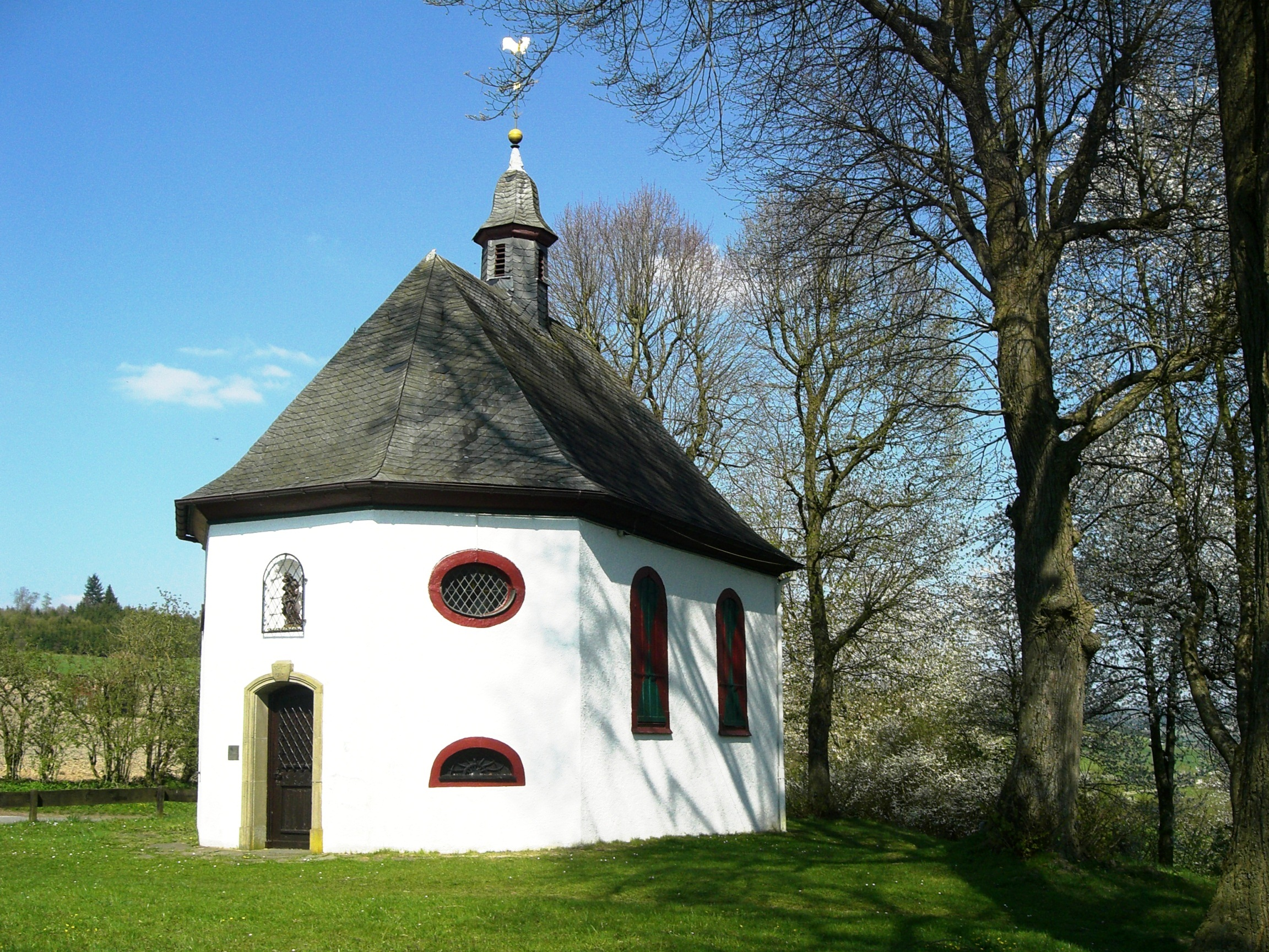 Denkmalgeschützte Kapelle aus dem Jahr 1731